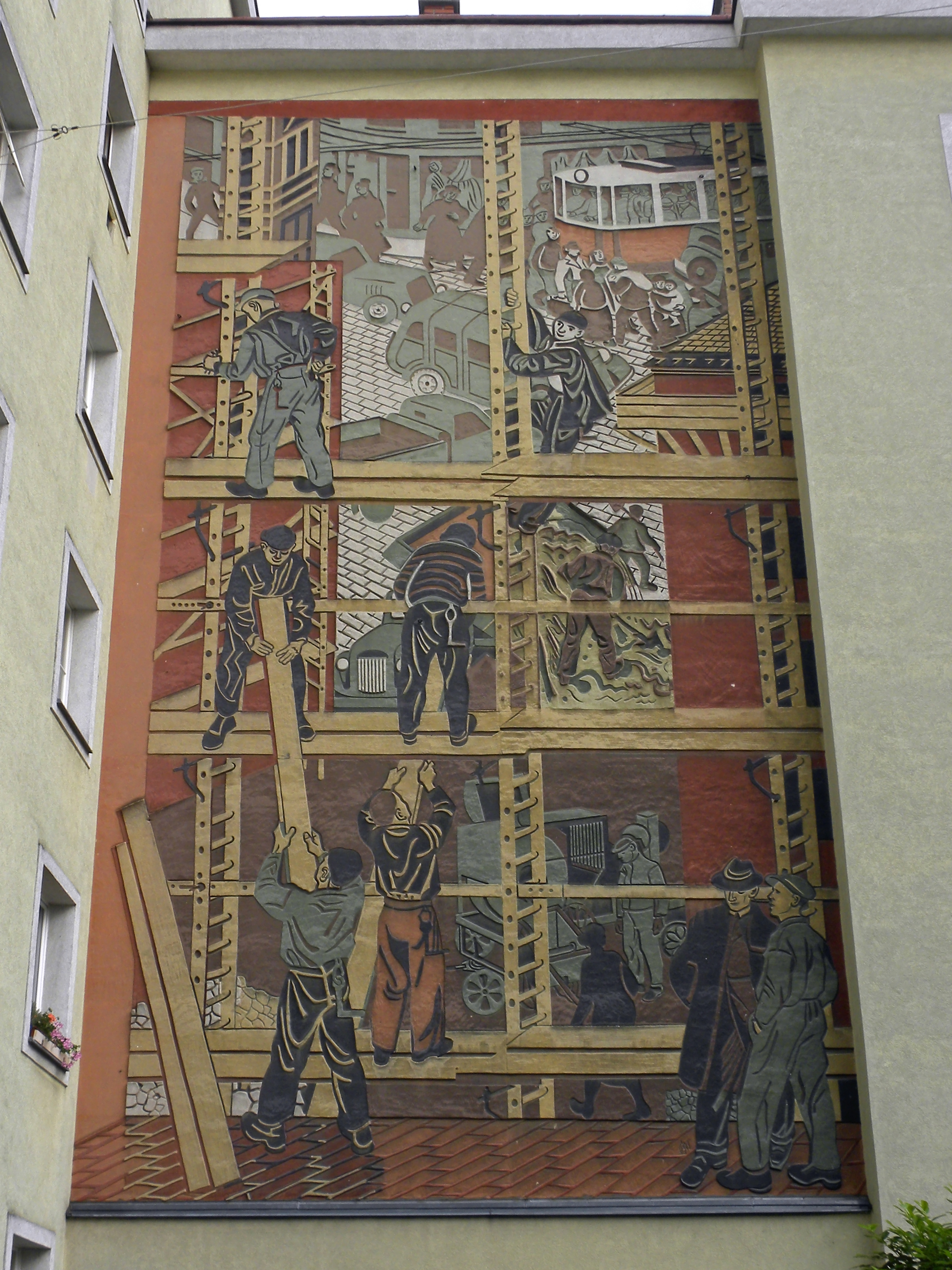 Das Sgraffito "Bauarbeiter" stammt von Hermine Aichenegg und befindet sich am Gemeindebau Leinneisgasse 4-8